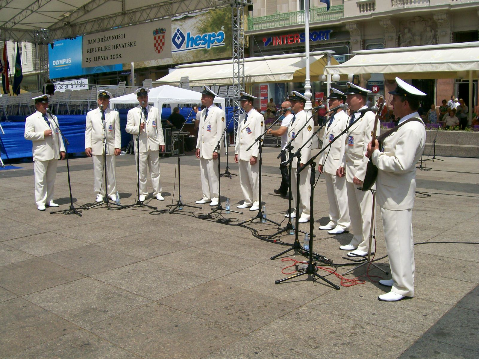 Klapa Hrvatske ratne mornarice